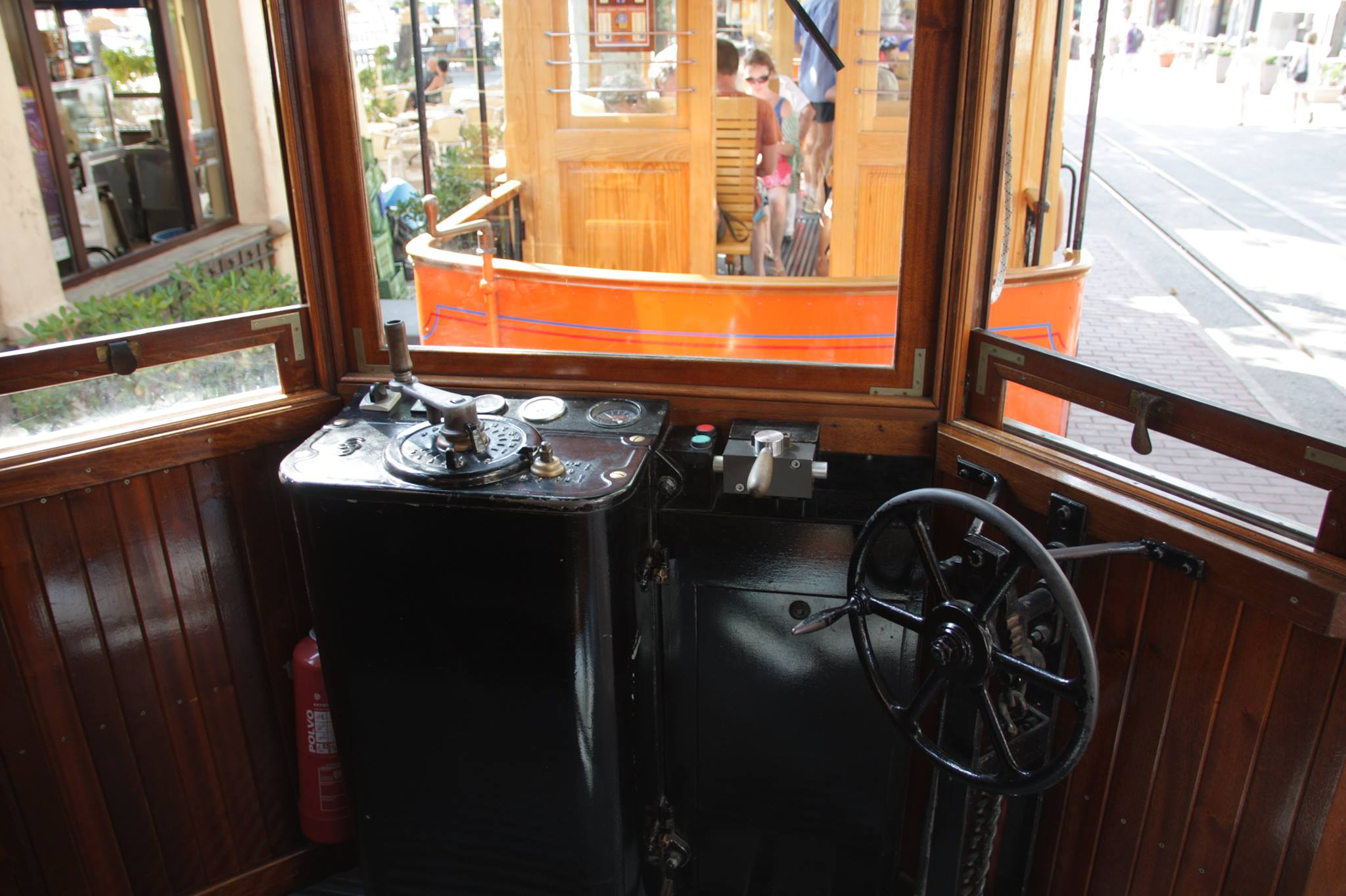 Cabina de Mandos del Tranvia que une Soller pueblo con el puerto